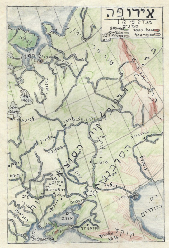 המפה צויירה בבית ספר של זרם העובדים בקריית חיים 1950.